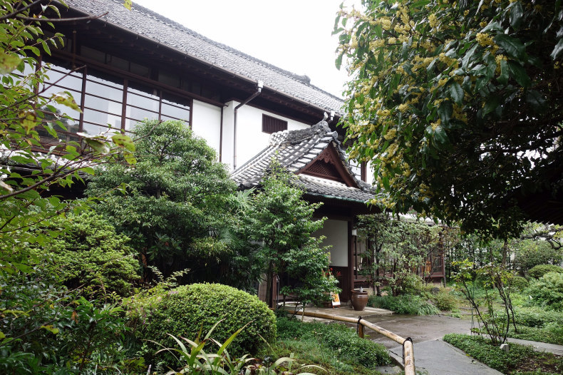 旧冨士屋旅館と敷地に存在する樹齢200年越えのウスギモクセイ